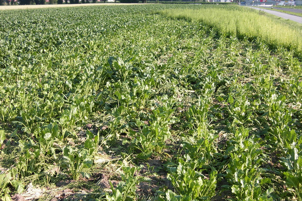 Wildrüben, Bastardrüben, Schosserrüben, Flurbereinigung...